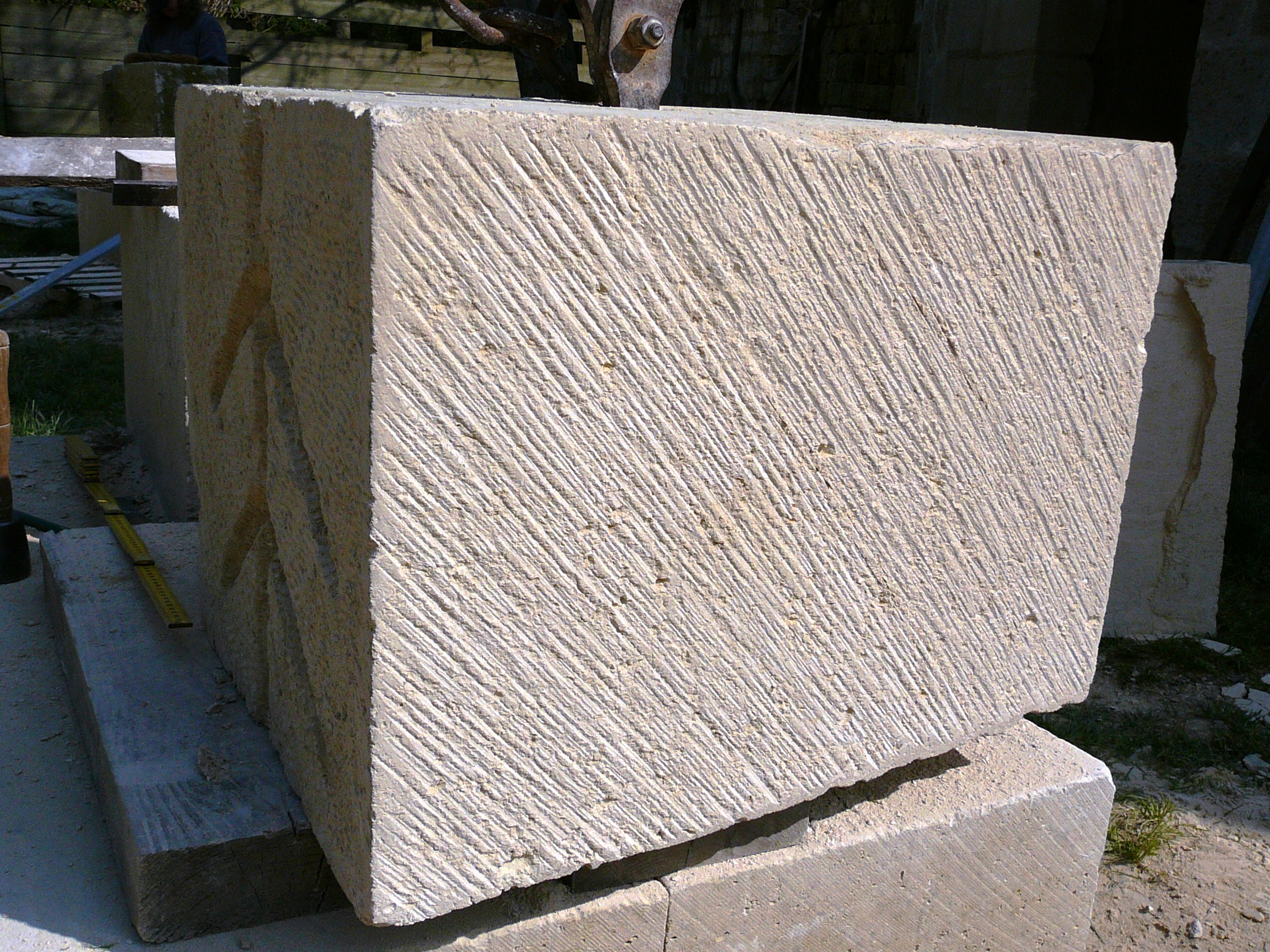 Pierre calcaire : face plane layée au taillant. Auteur : So Leblanc